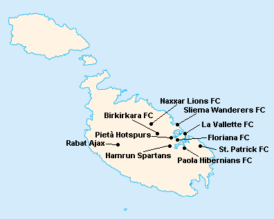 Répartition des clubs en Premier League Maltaise 1998-1999.